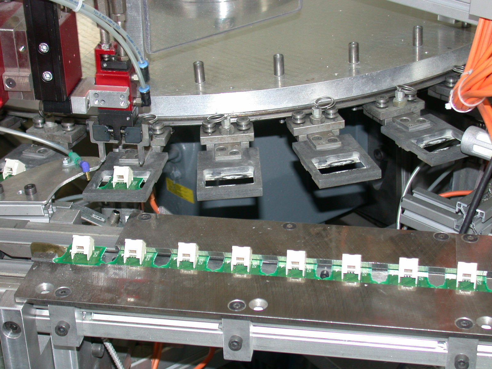 Sondermontageanlage zur Herstellung von (Ethernet-) Cat-6-Steckdosen